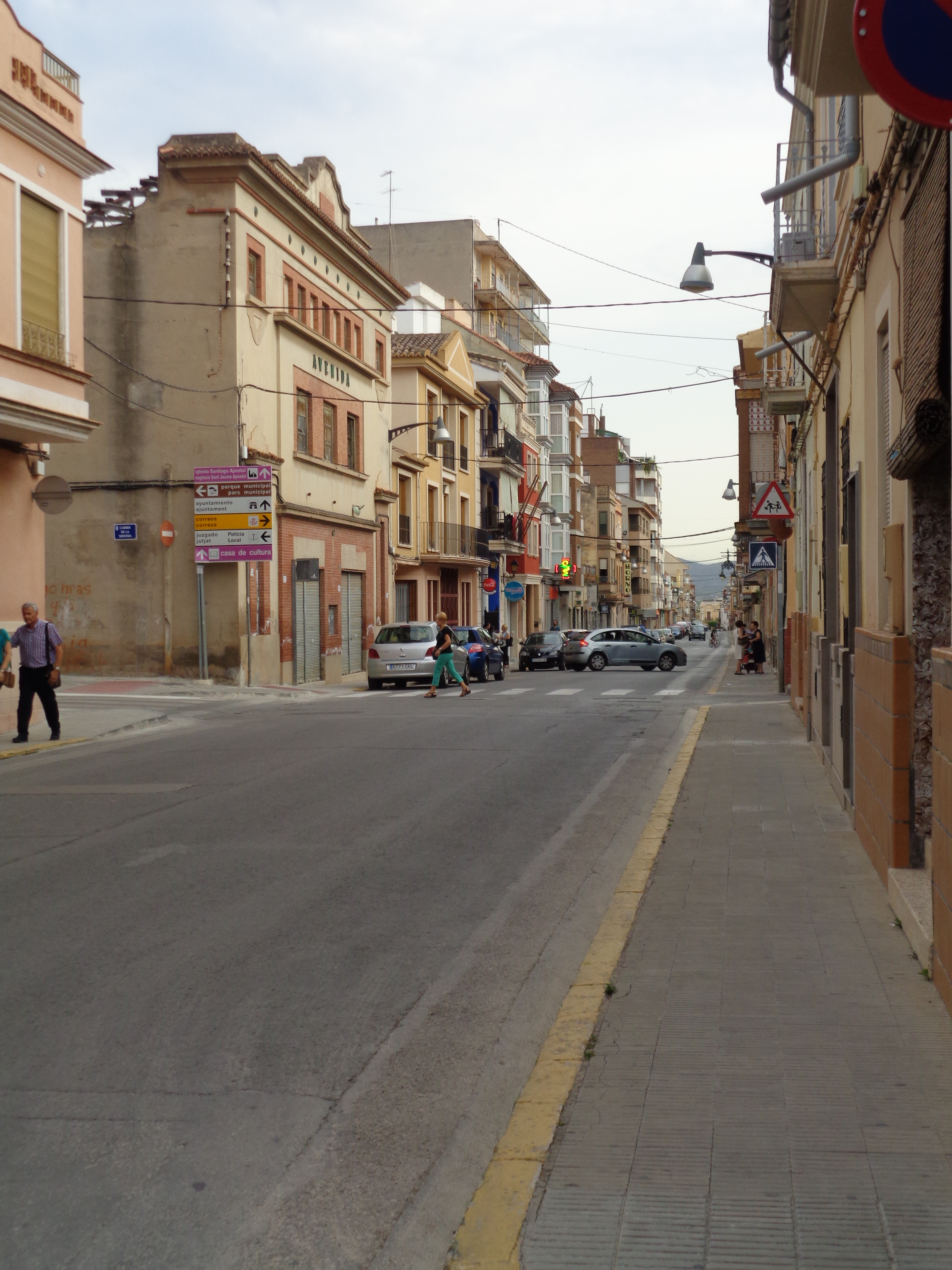 La Pobla de Vallbona.